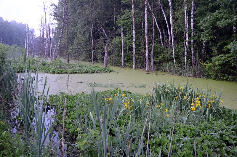 Безымянный ручей, Ульяновский лесопарк - ирисы жёлтые